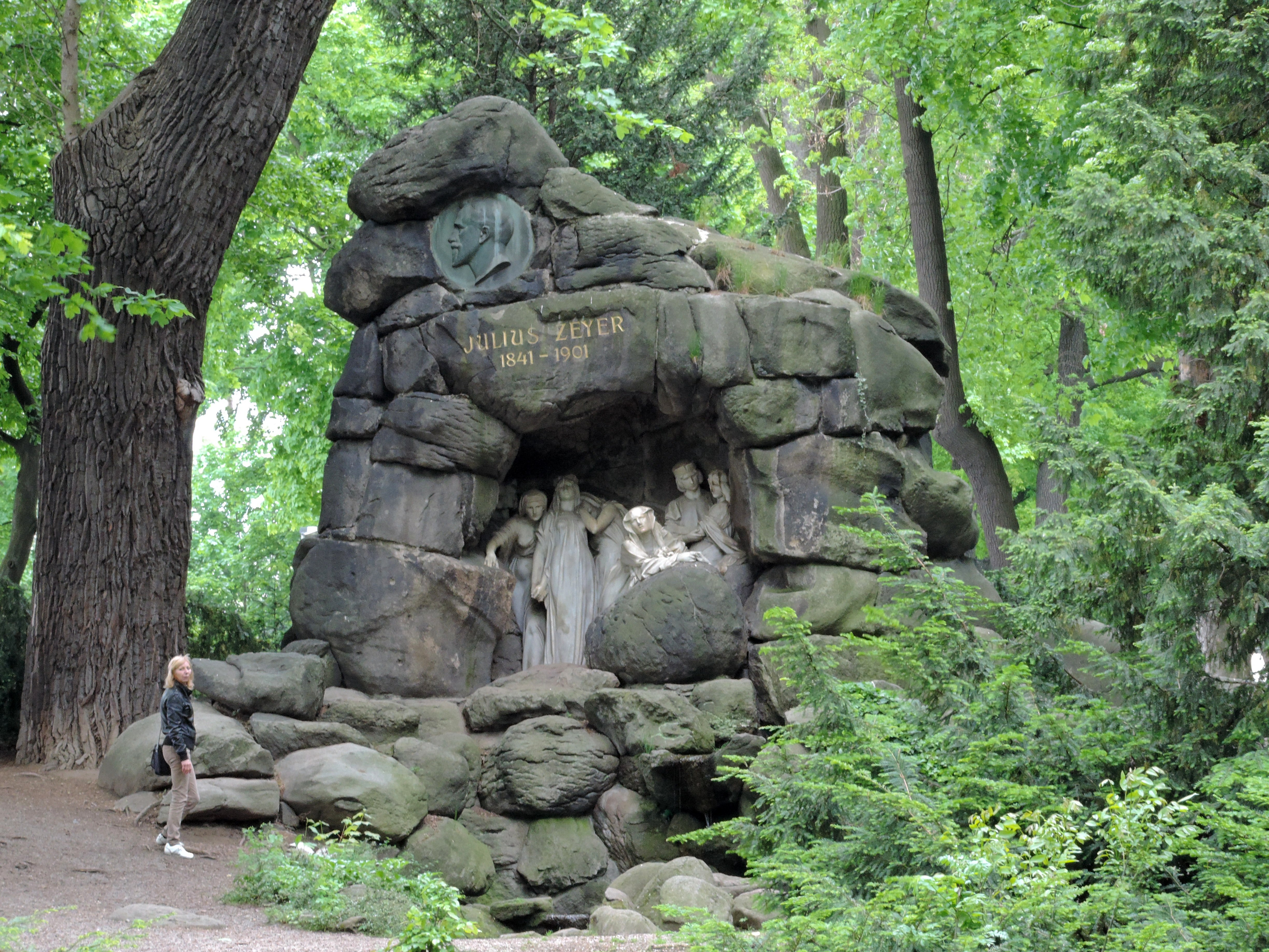 Julius Zeyer - památník